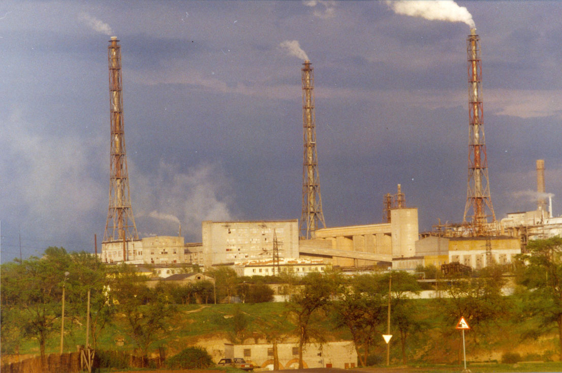 Волховский аллюминевый завод